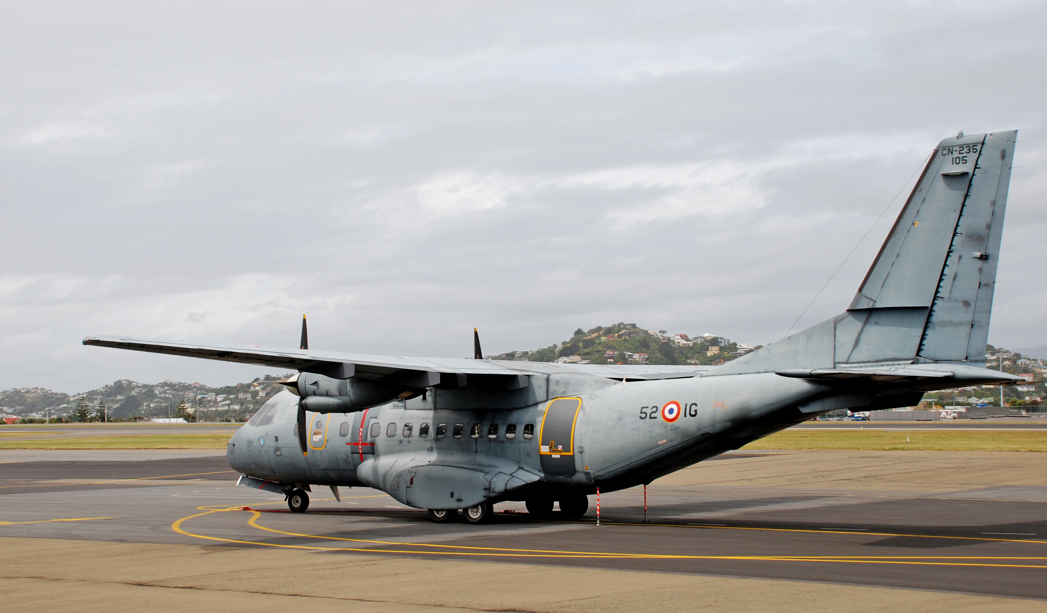 Escadron de Transport outre-mer 00.052 Tontouta (Nouvelle-Calédonie)